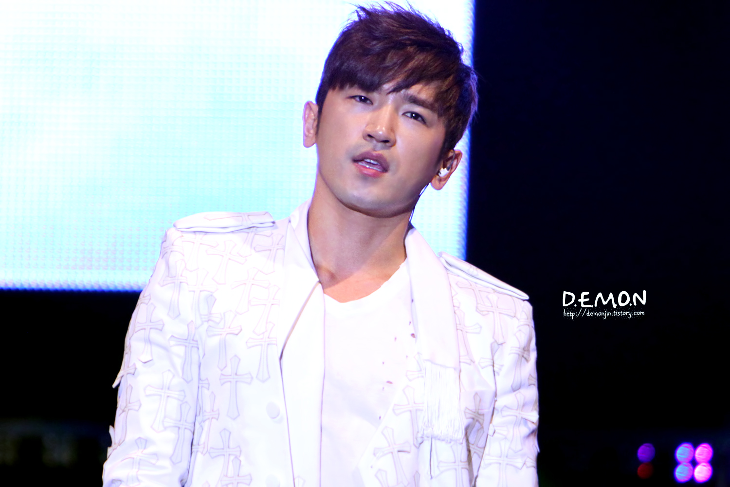 120811 전주 빅4 콘서트